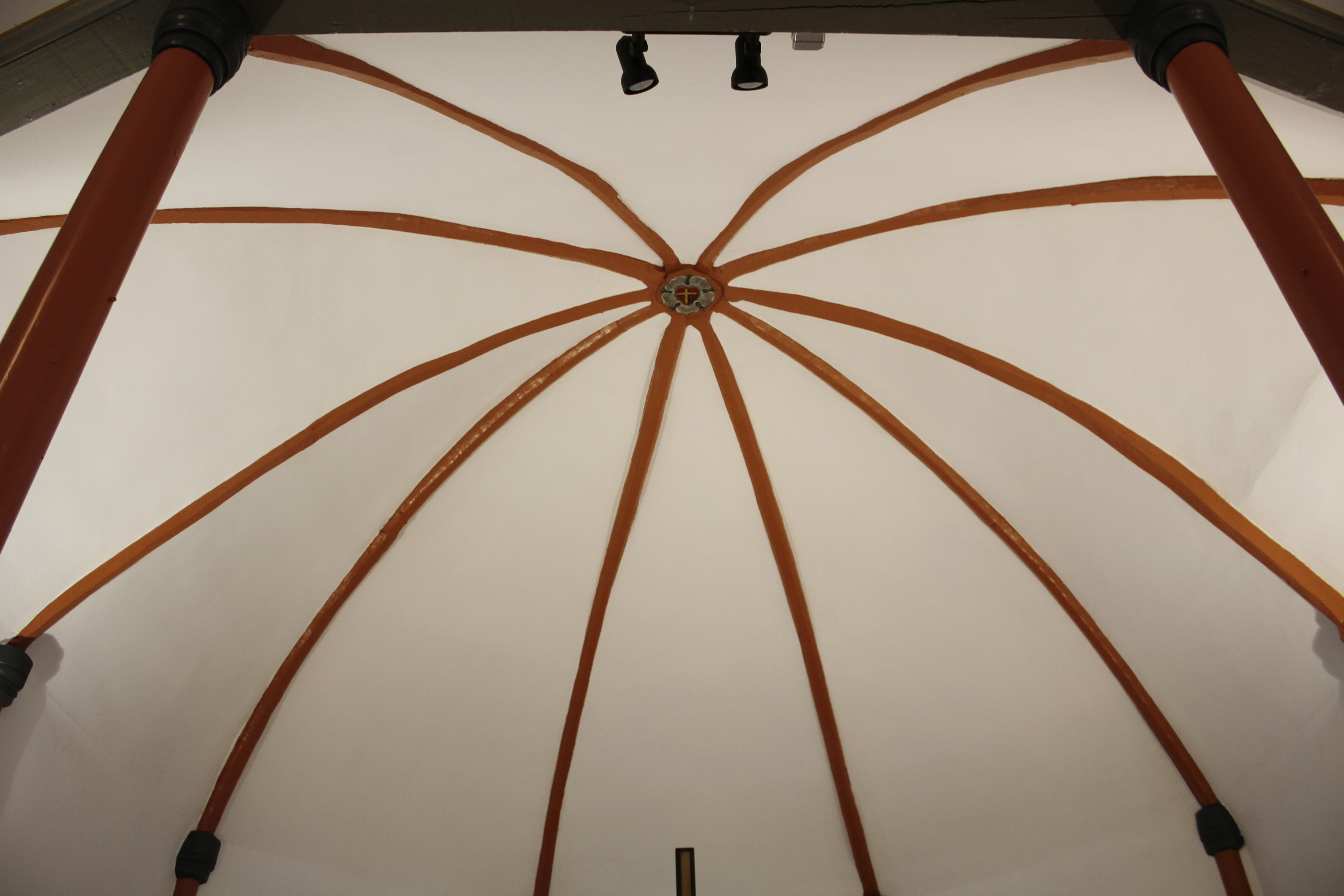 Evangelische Kirche Niederwetz, Gemeinde Schöffengrund, Hessen, Deutschland